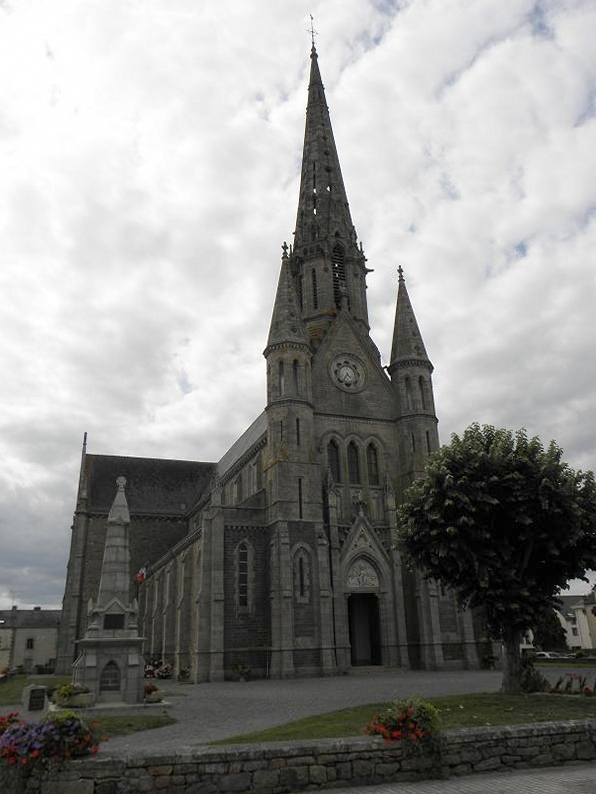 Église Saint-Jean-Baptiste à Bains-sur-Oust (Ille-et-Vilaine, Bretagne, France).